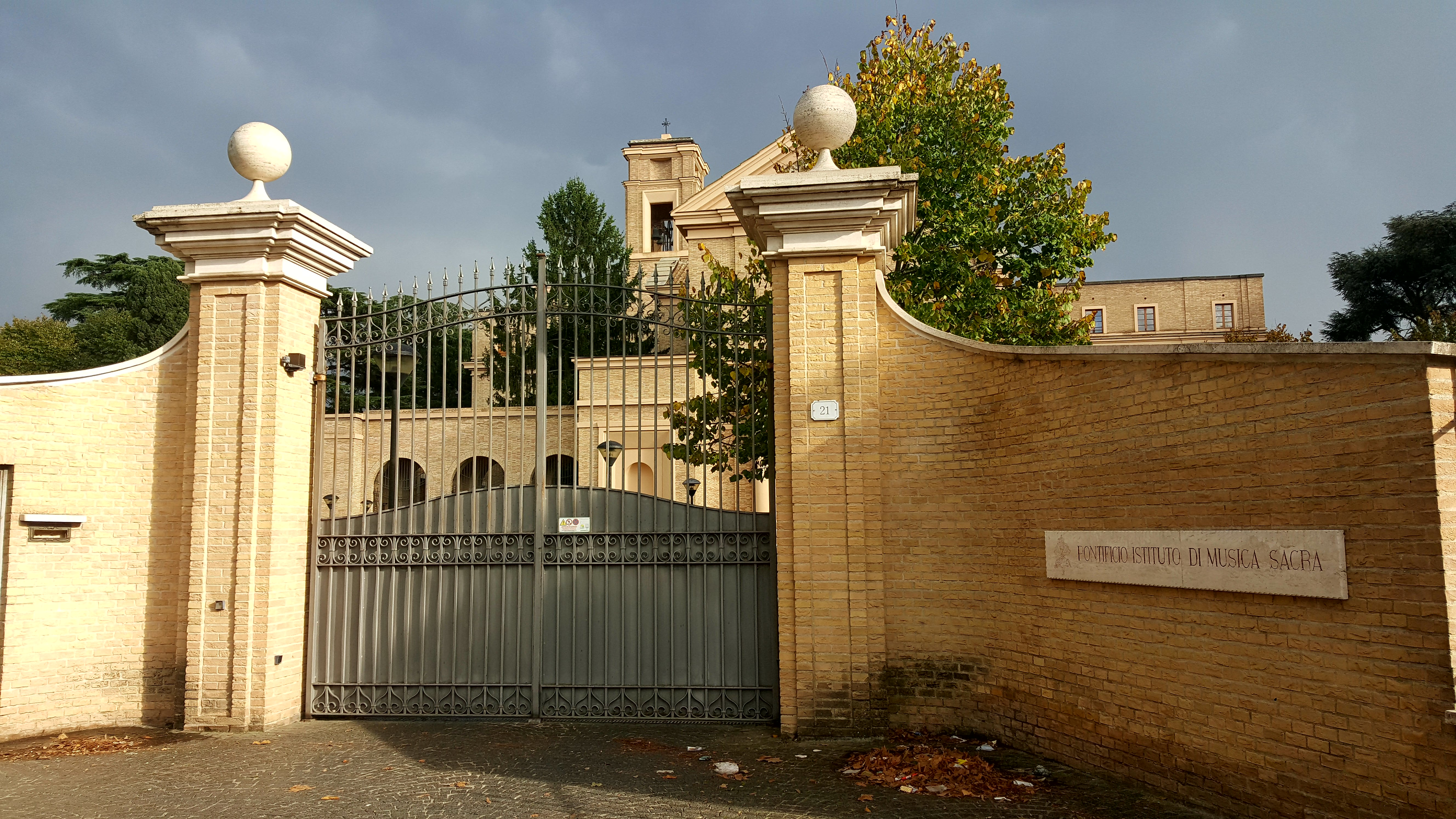 Sede del Pontificio Istituto di musica sacra a Roma.